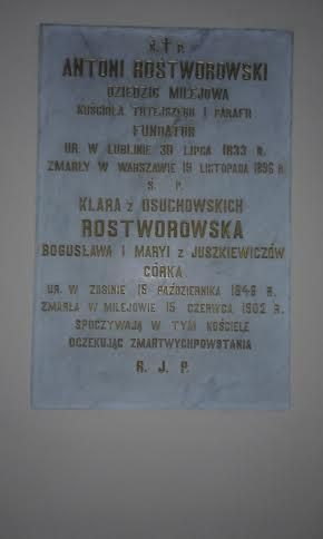 Tablica nagrobna pochowanych w milejowskim kościele fundatorów tejże świątyni.